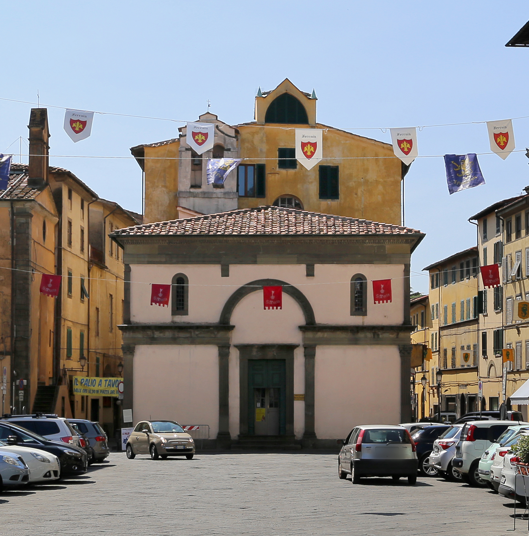 piazza Giuseppe Mazzini This is a photo of a monument which is part of cultural heritage of Italy.